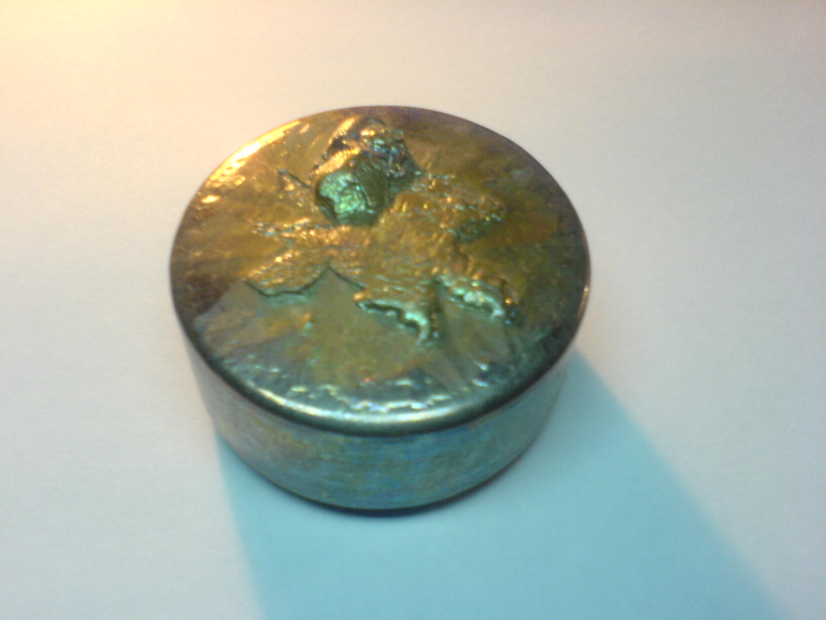 Слиток металлического висмута